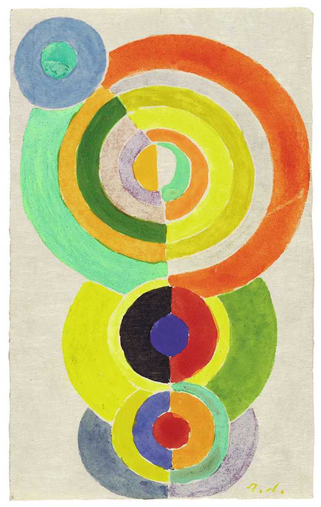 Rhythme 1, Gouache und Tuschpinsel auf Japan 19.3 x 11.8 cm (eins von 18 Unikaten dieser Komposition mit wechselnden Farbstellungen)